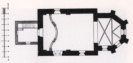 Půdorys